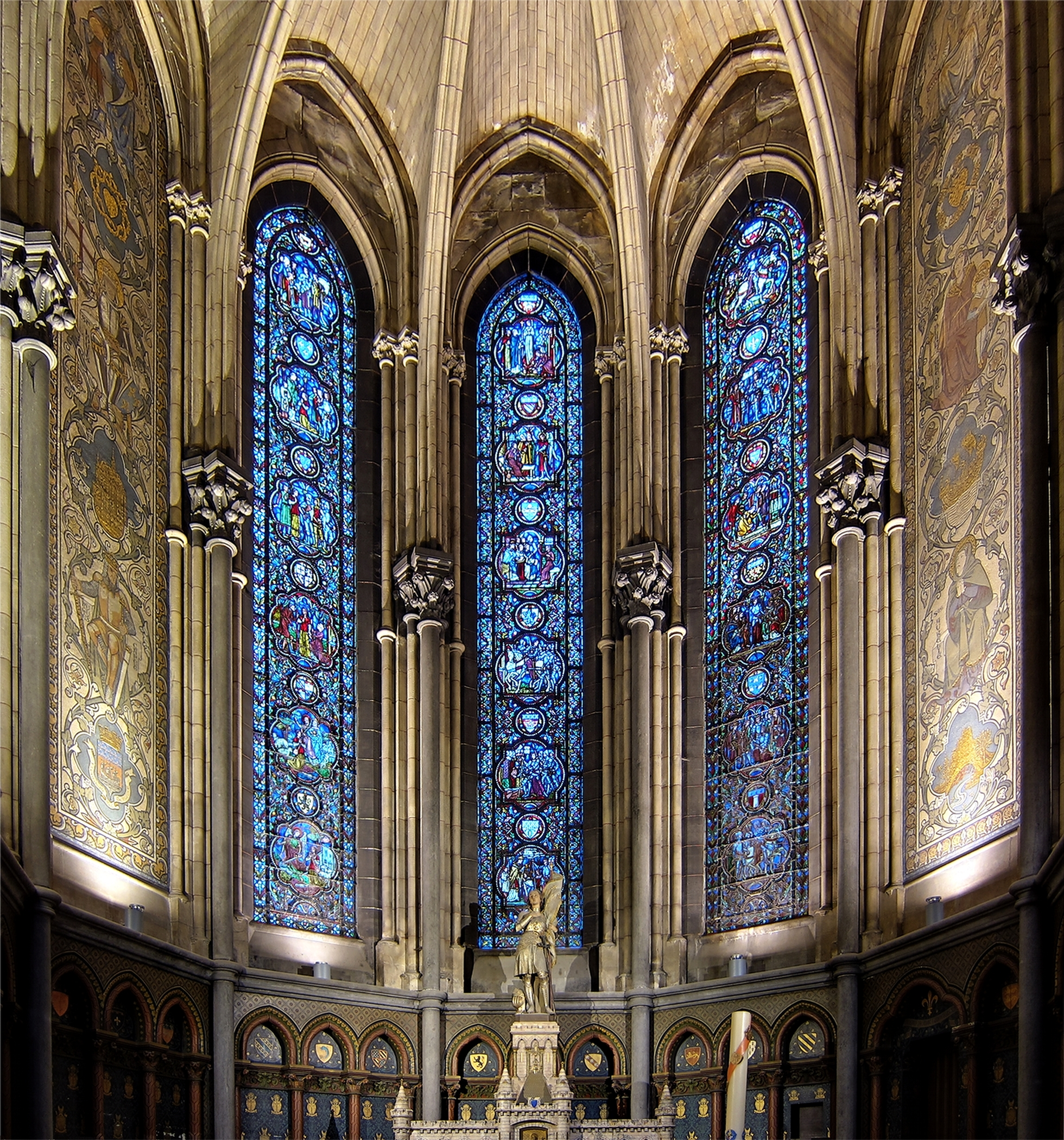 La chapelle Sainte Jeanne d'arc dans la cathédrale Notre-Dame-de-la-Treille de Lille (Nord).